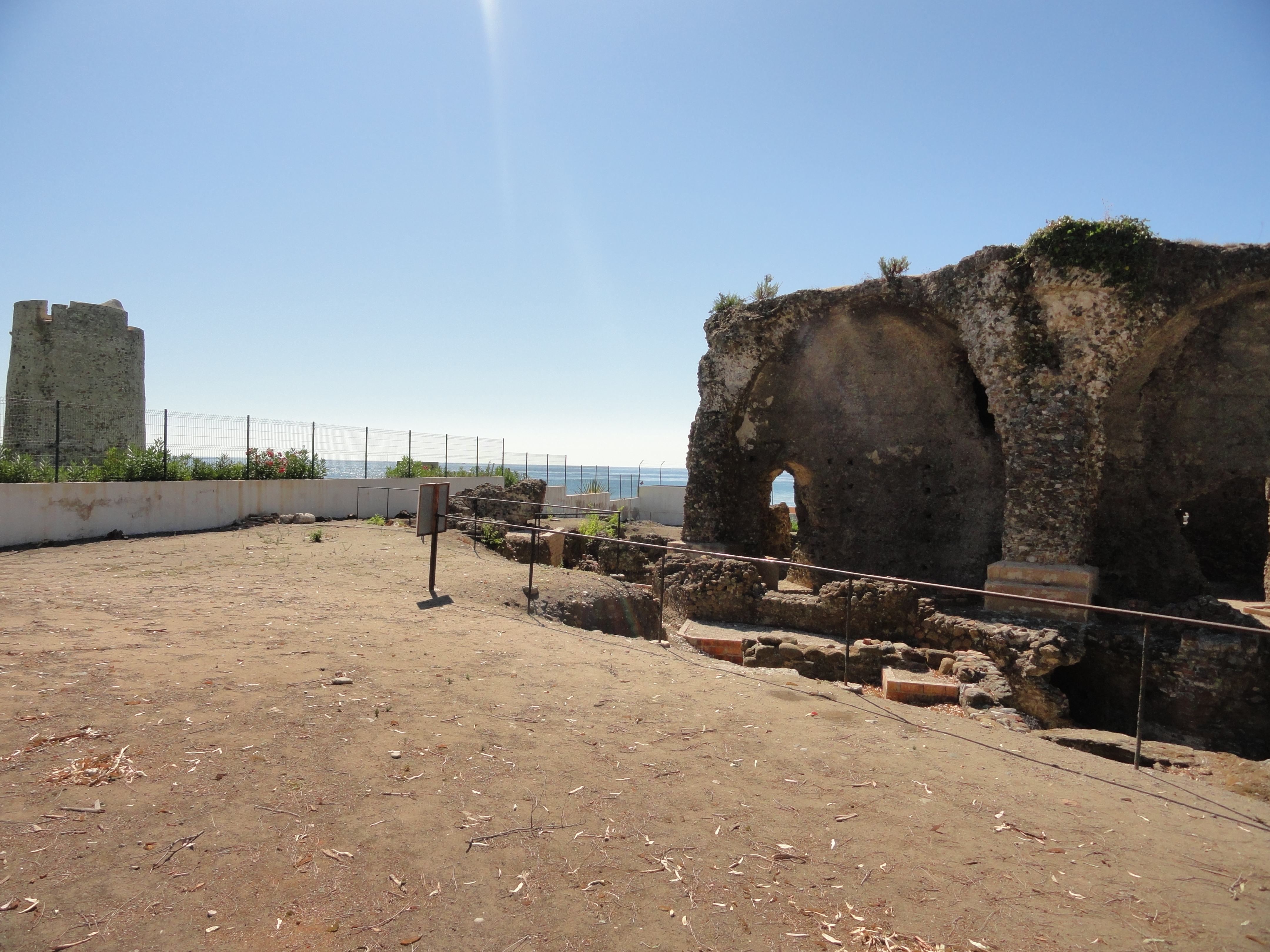 Termas romanas de las Bóvedas